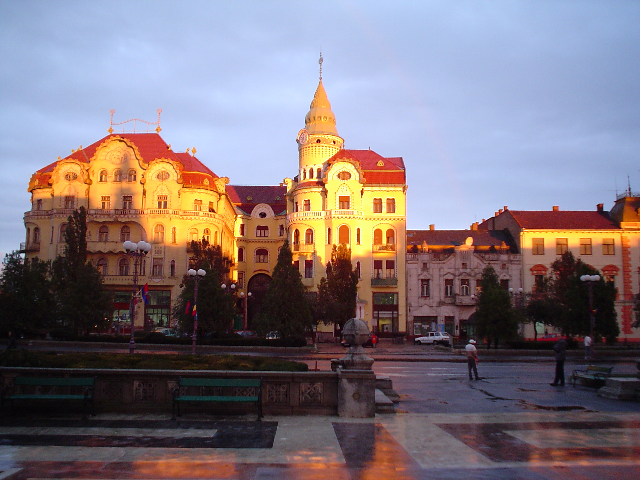 Hotel Vulturul Negru, Oradea, Romania. Architects: Marcell Komor and Dezső Jakab, 1907-1909.